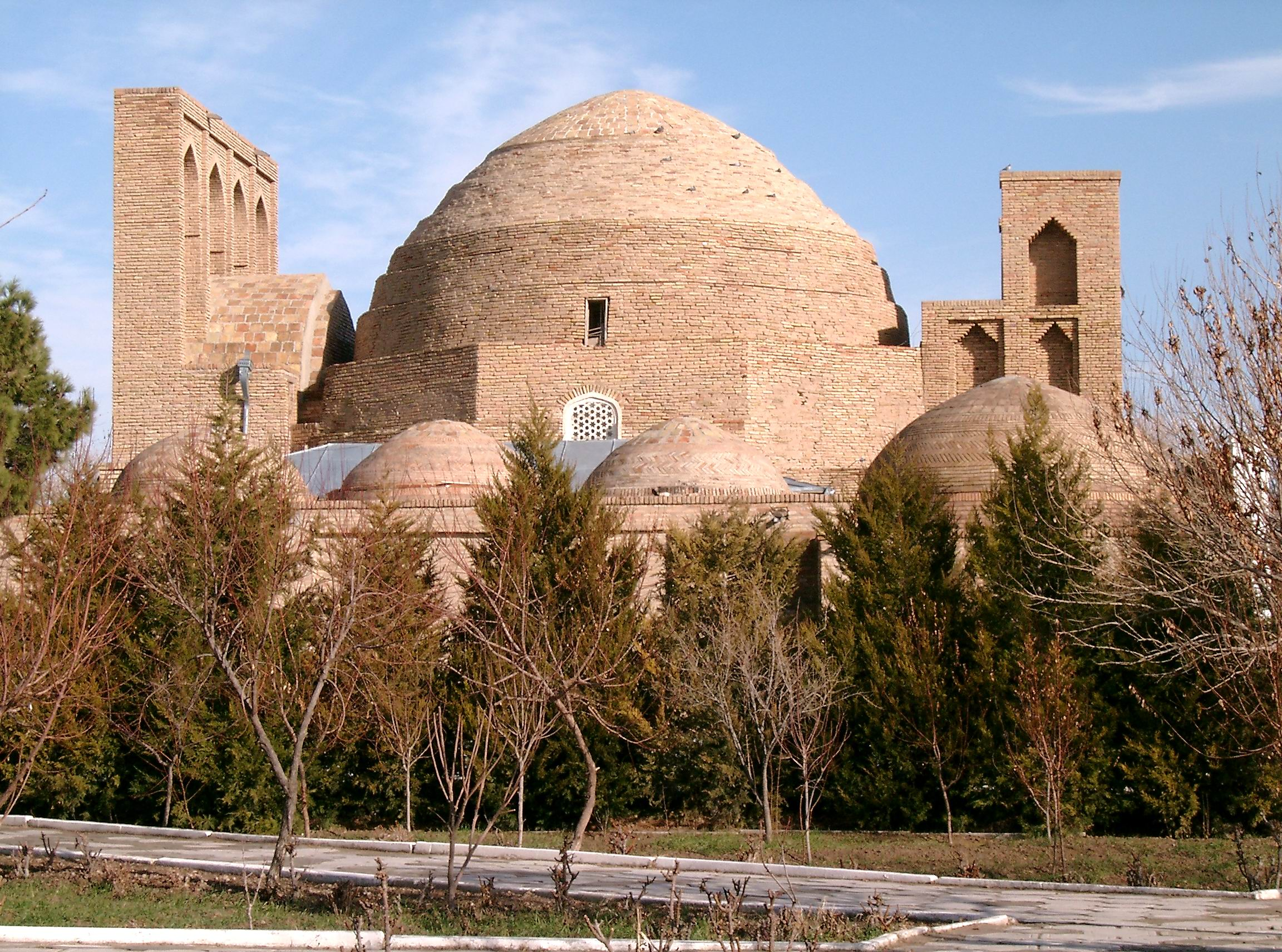 Khakim-at-Termezi-Komplex, Termiz, Usbekistan eigene Aufnahme